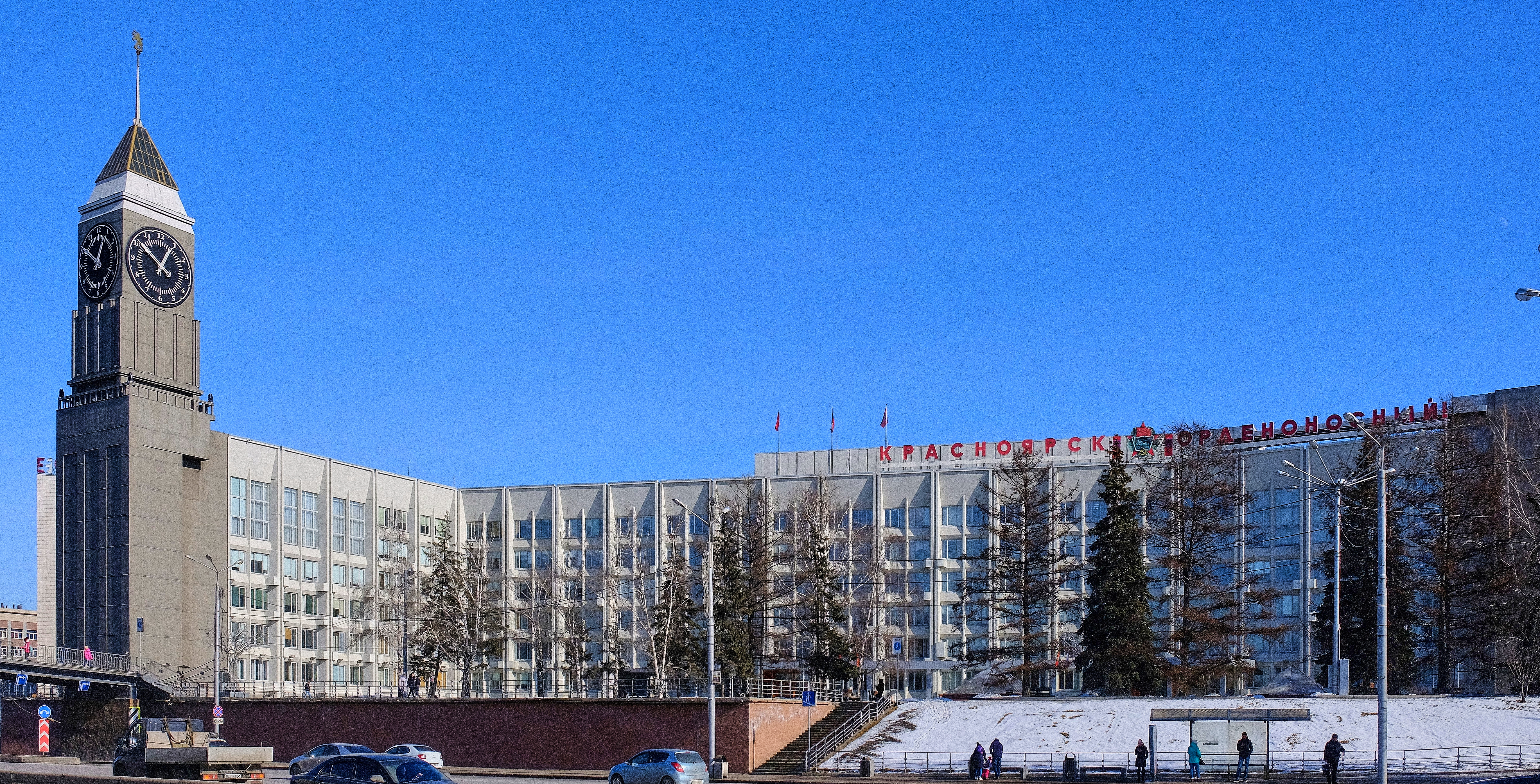 Администрация Красноярска